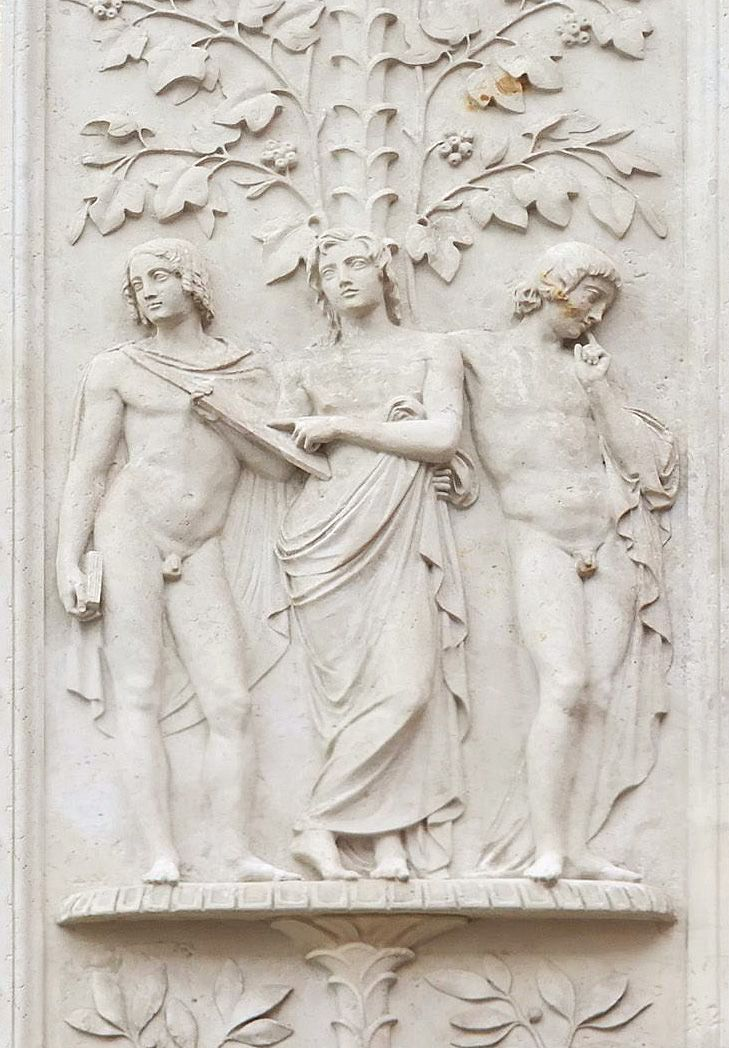 Rechte Säule des Schinkeltors am Neuen Augusteum